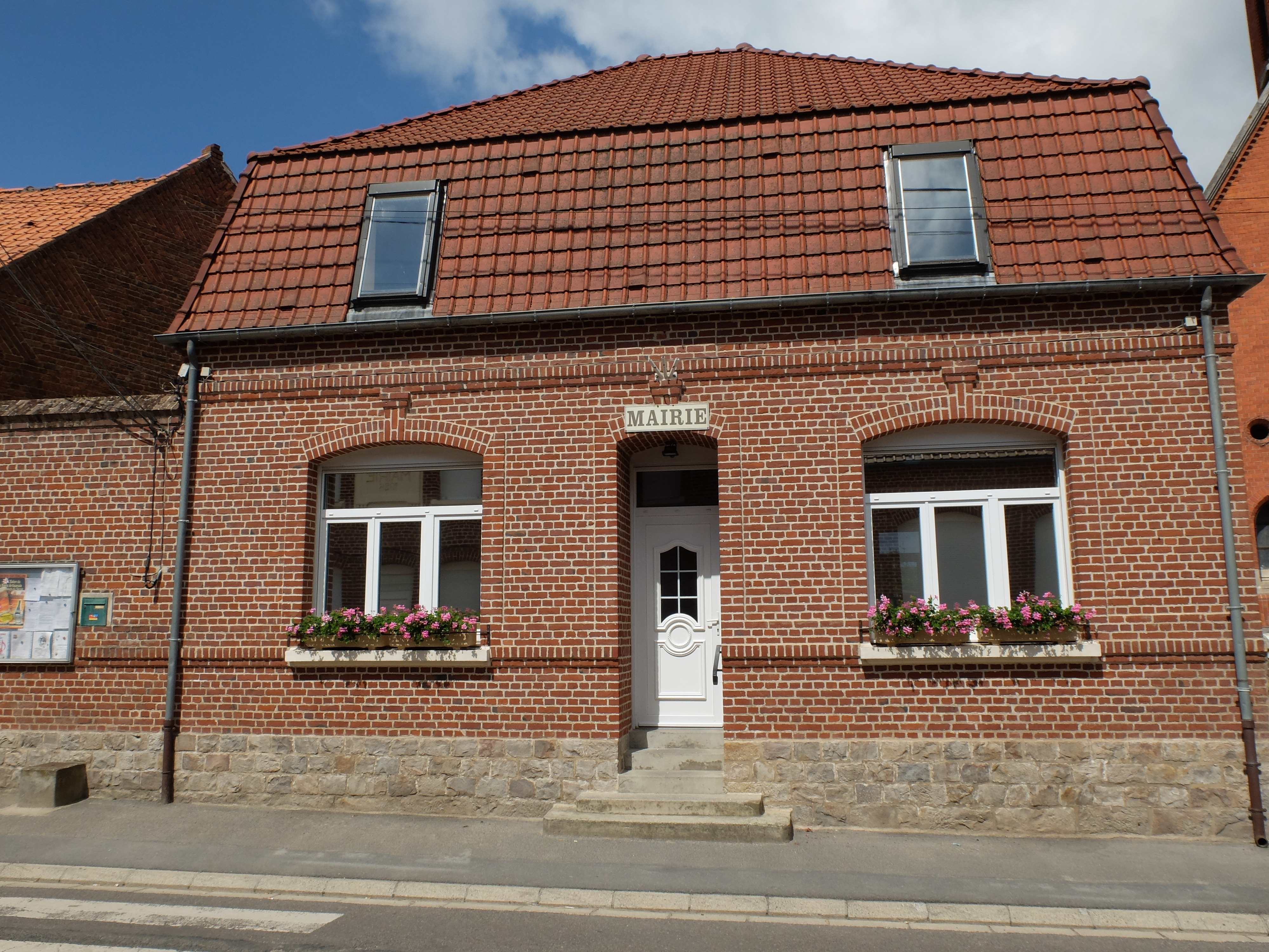 Vue de la mairie de Noyelles-sous-Bellonne.